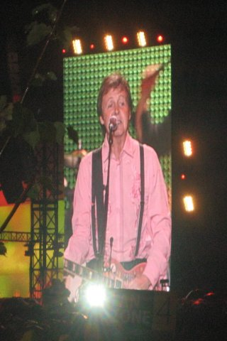 Пол Маккартні, Independence Concert, Київ